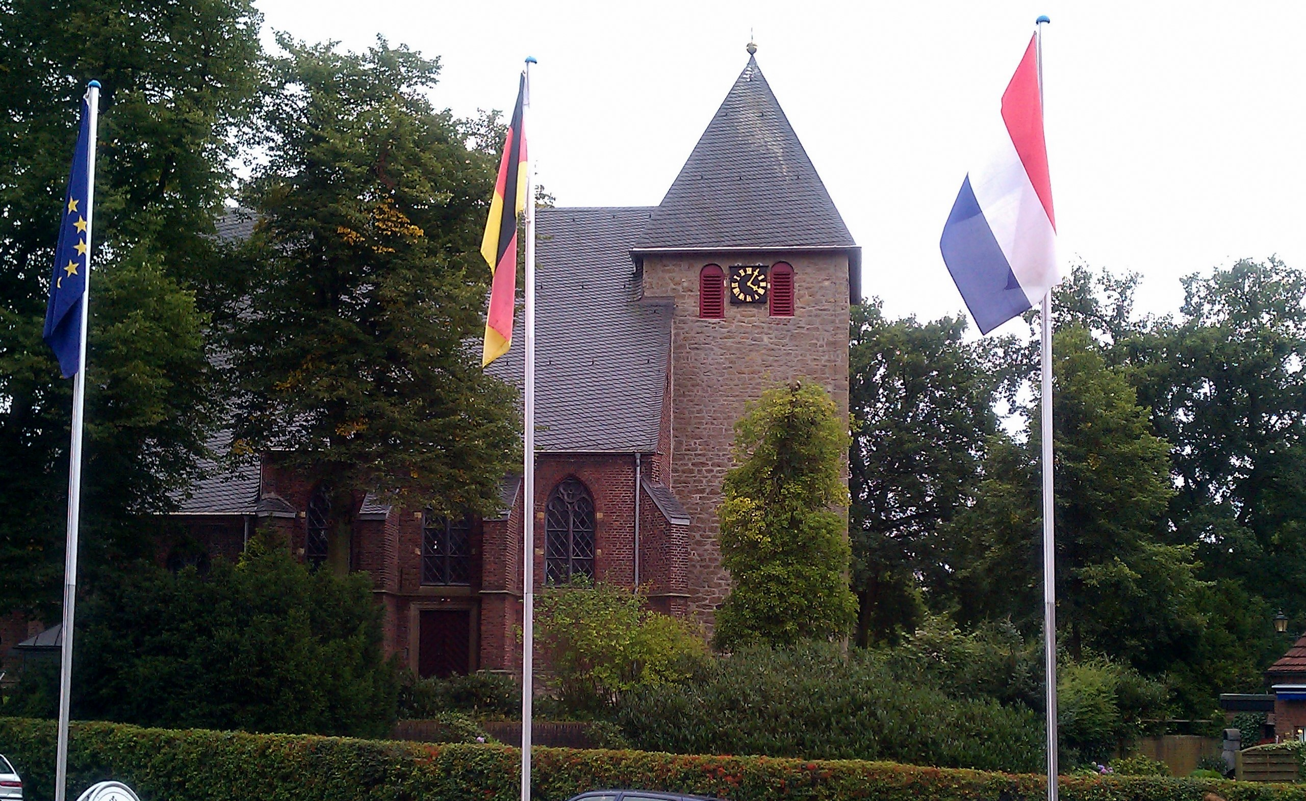 Gahlen – Ev. Dorfkirche aus dem 12. Jahrh.